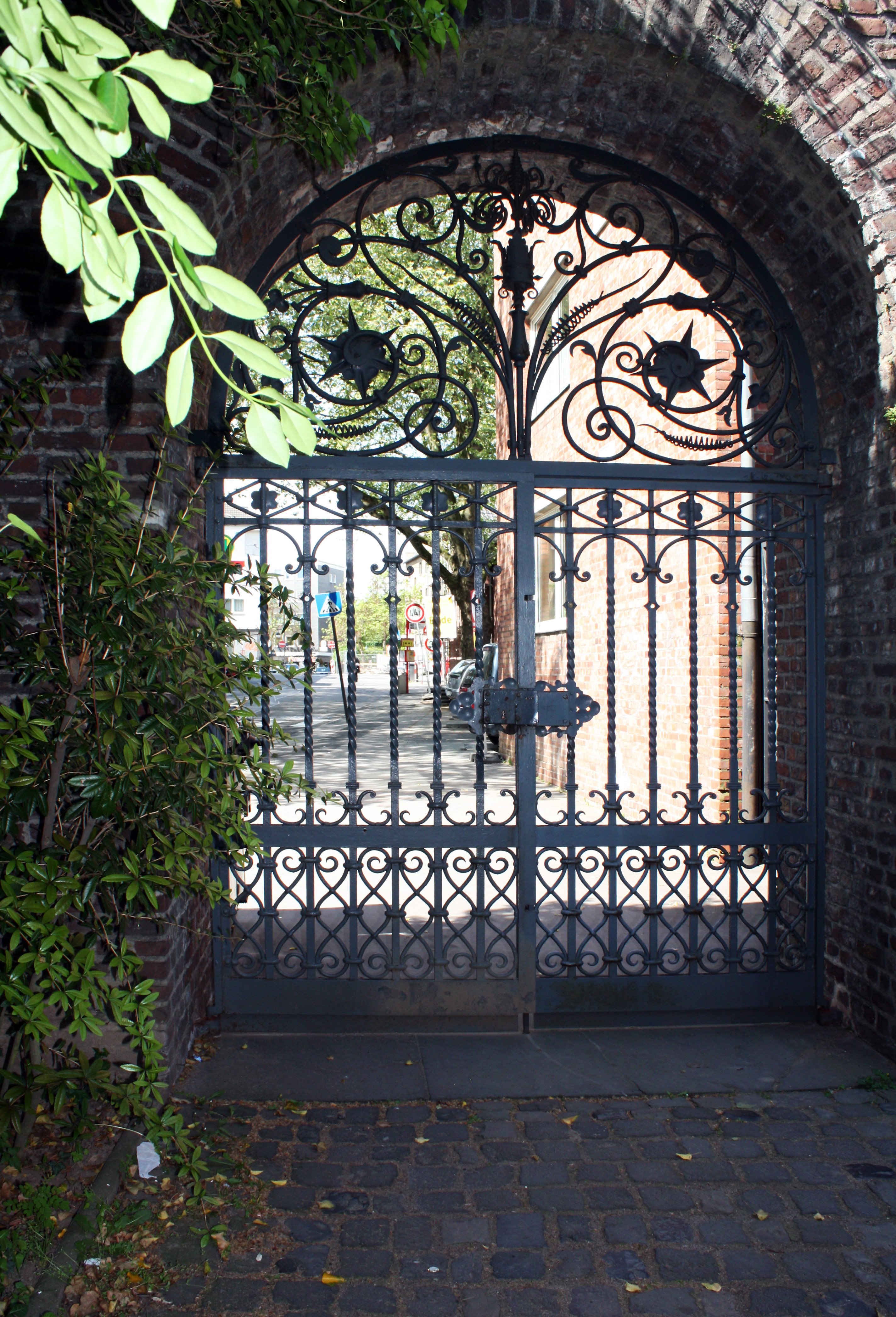 Sankt Gregorius im Elend, Köln. Eingangstor, ehemals das Eingangsgitter des "Spanischer Bau" genannten, ergänzenden Rathaubau in der Kölner Altstadt